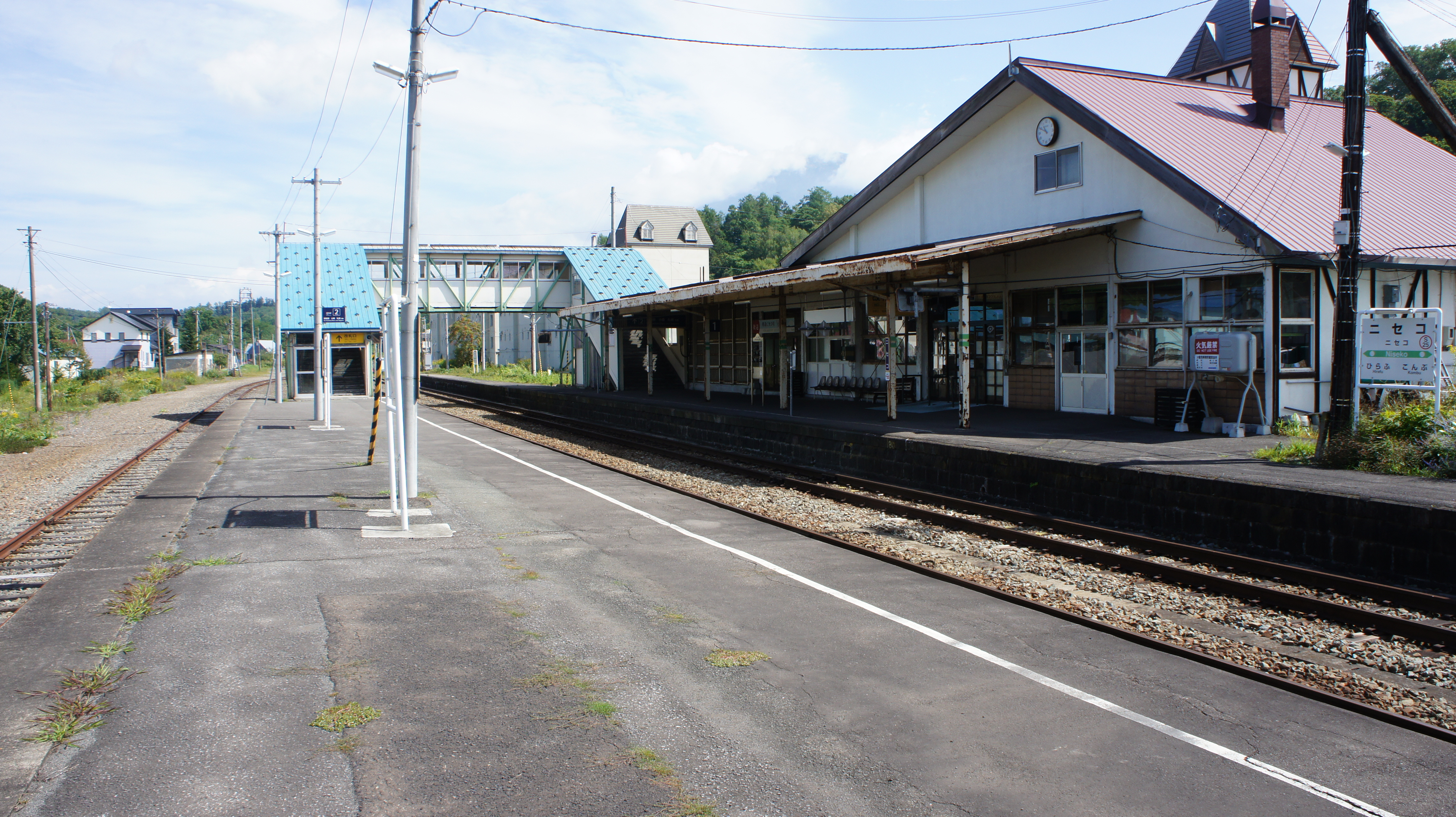 JR函館本線・ニセコ駅のホーム Sony NEX-3